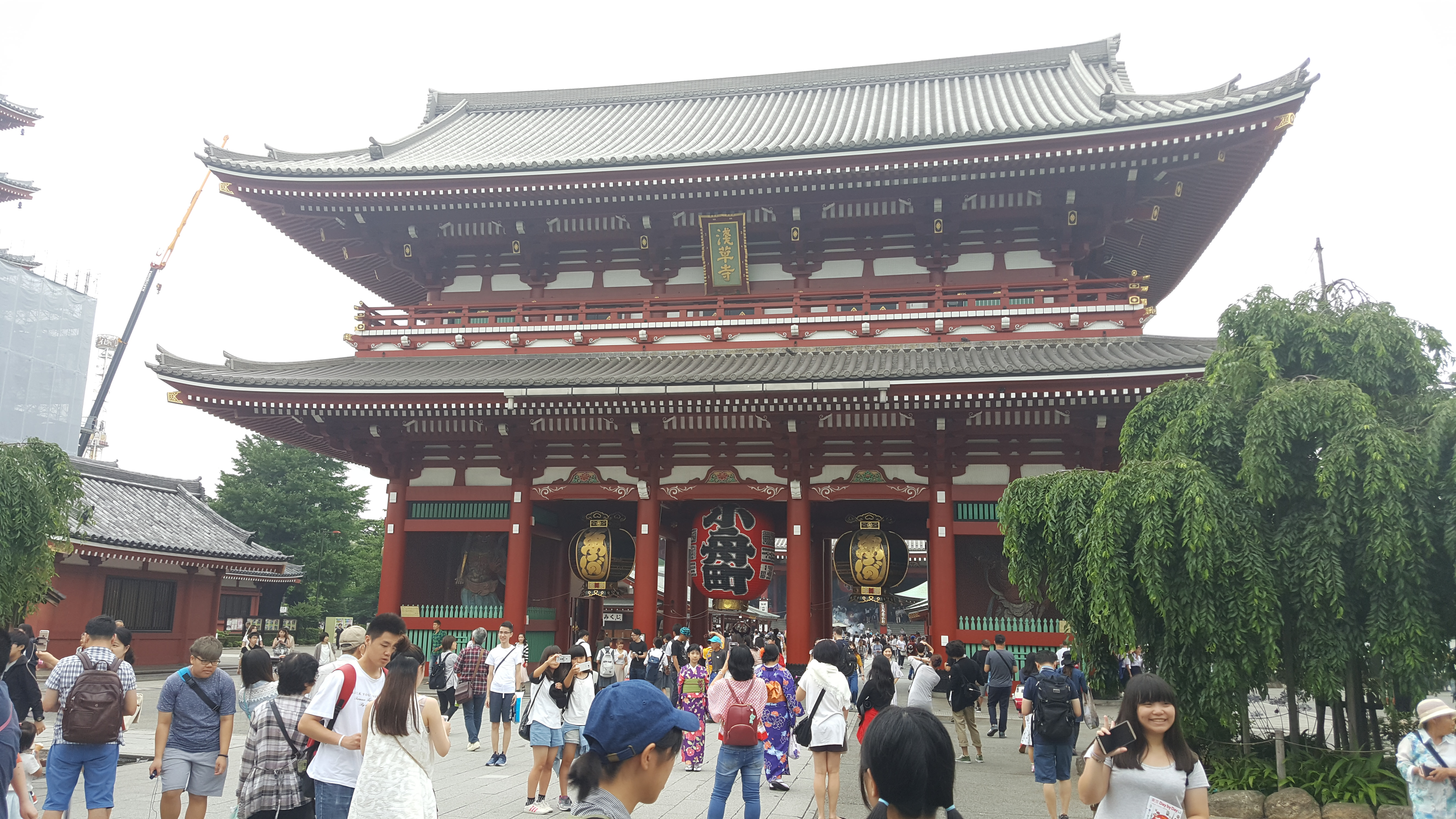 2016년 6월 센소지 호조문